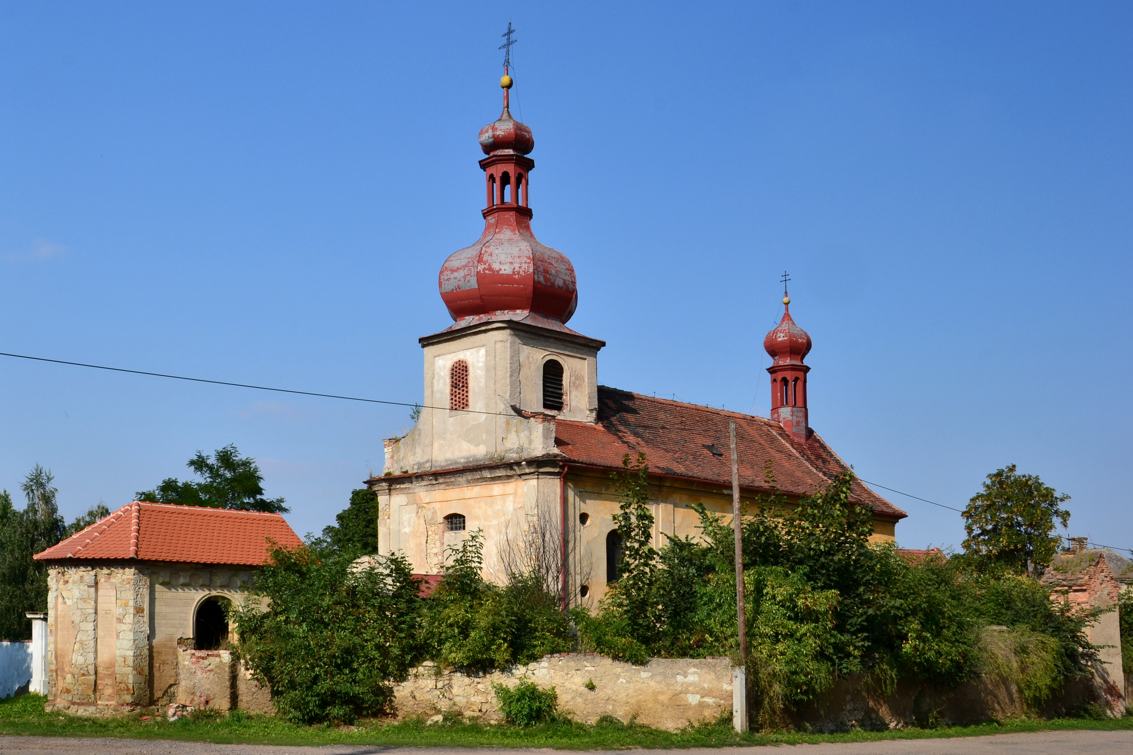 Kostel sv. Václava (Radíčeves), Radíčeves